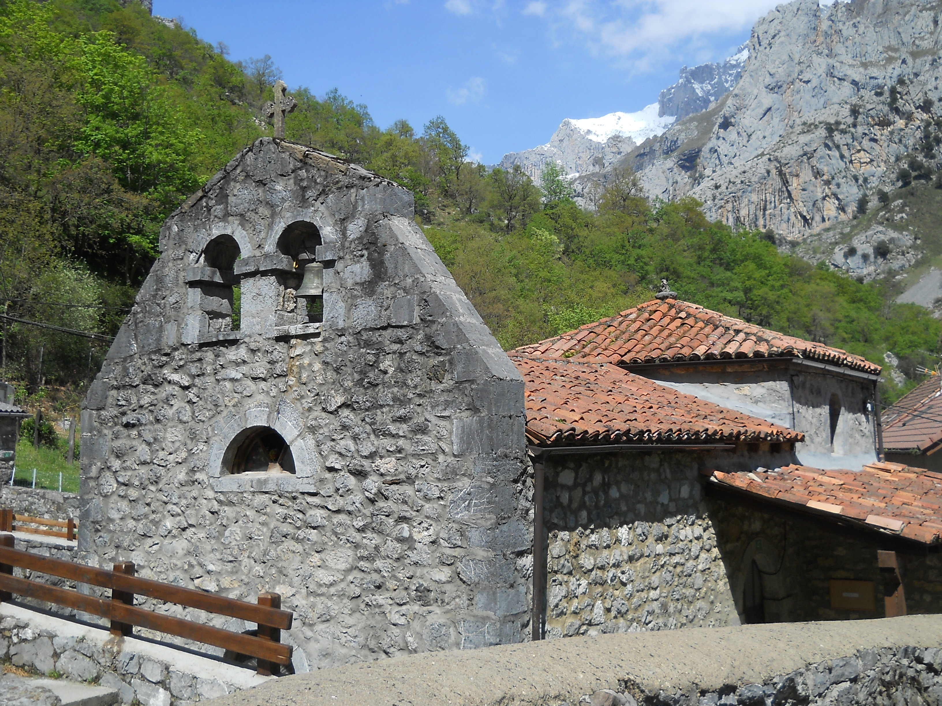 Chiesa di san Tommaso, Caín, Posada de Valdeón, León, Spagna